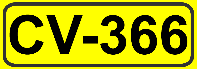 Inidcador de la Carretera de la Comunidad Valenciana CV-366